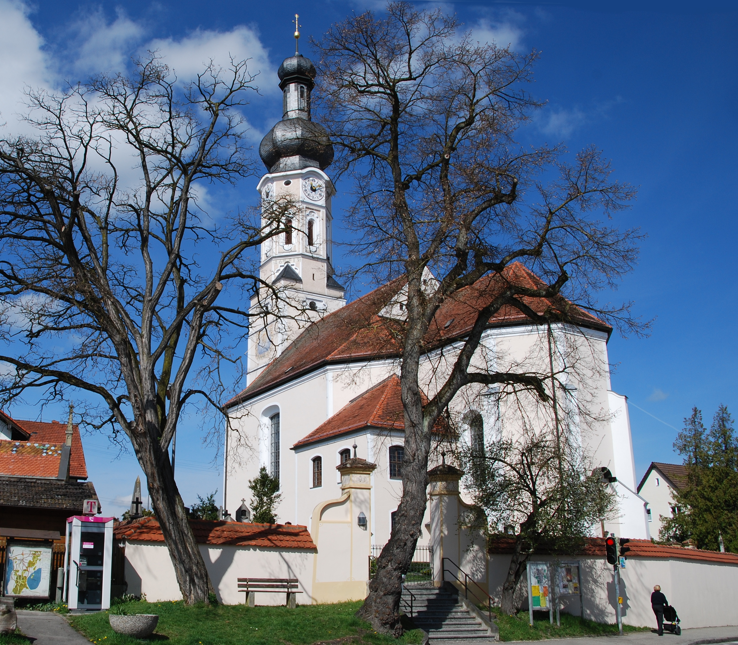 Inning am Ammersee, Katholische Pfarrkirche St. Johannes der Täufer. Die barocke Anlage wurde 1765 von Leonhard Matthäus Gießl unter Einbeziehung spätmittelalterlicher Bauteile errichtet.